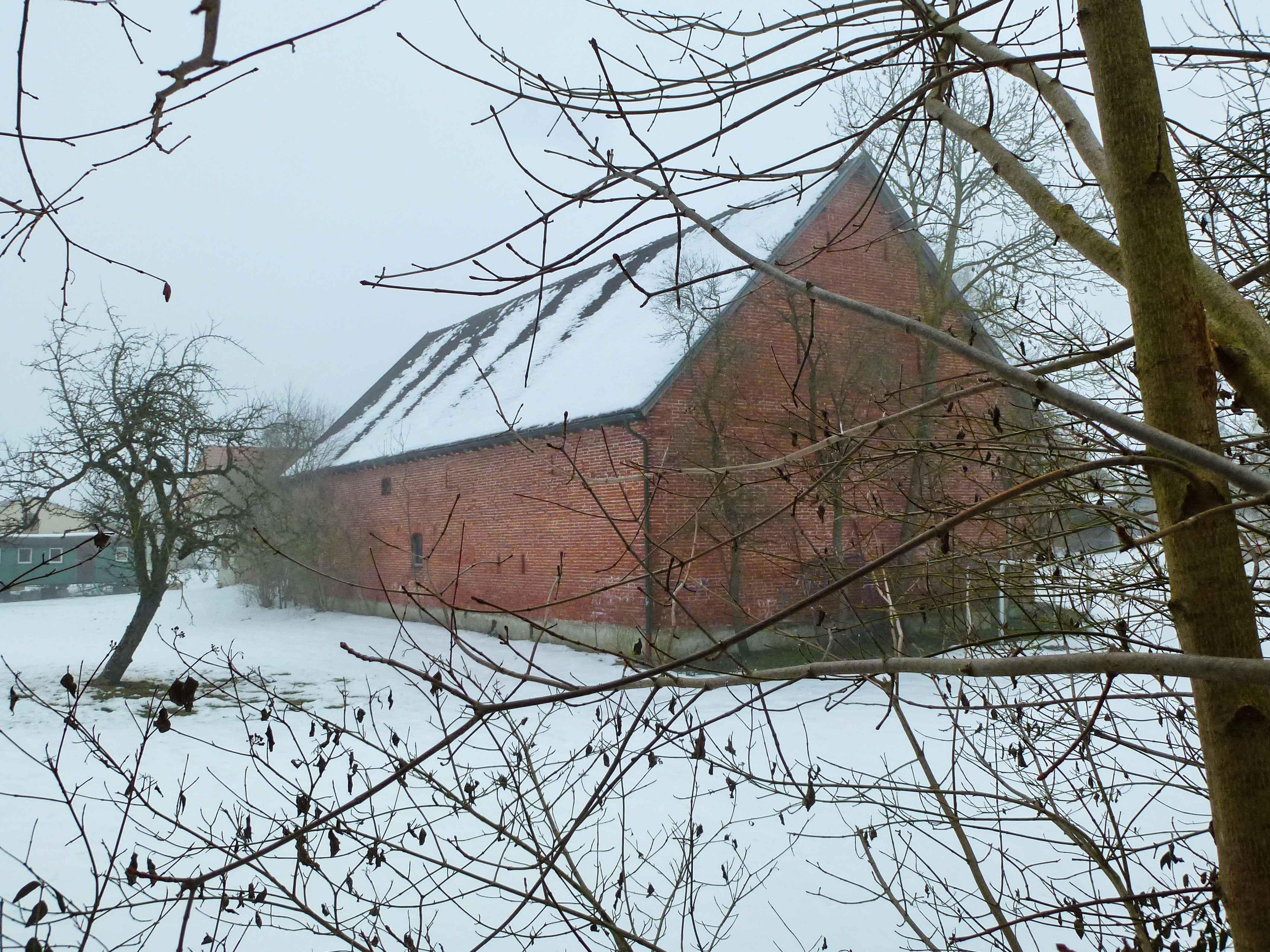 Greifenberg-Beuern_Ehem Pfarrhaus Dorfstr7, Backsteinbau, Ansicht von W